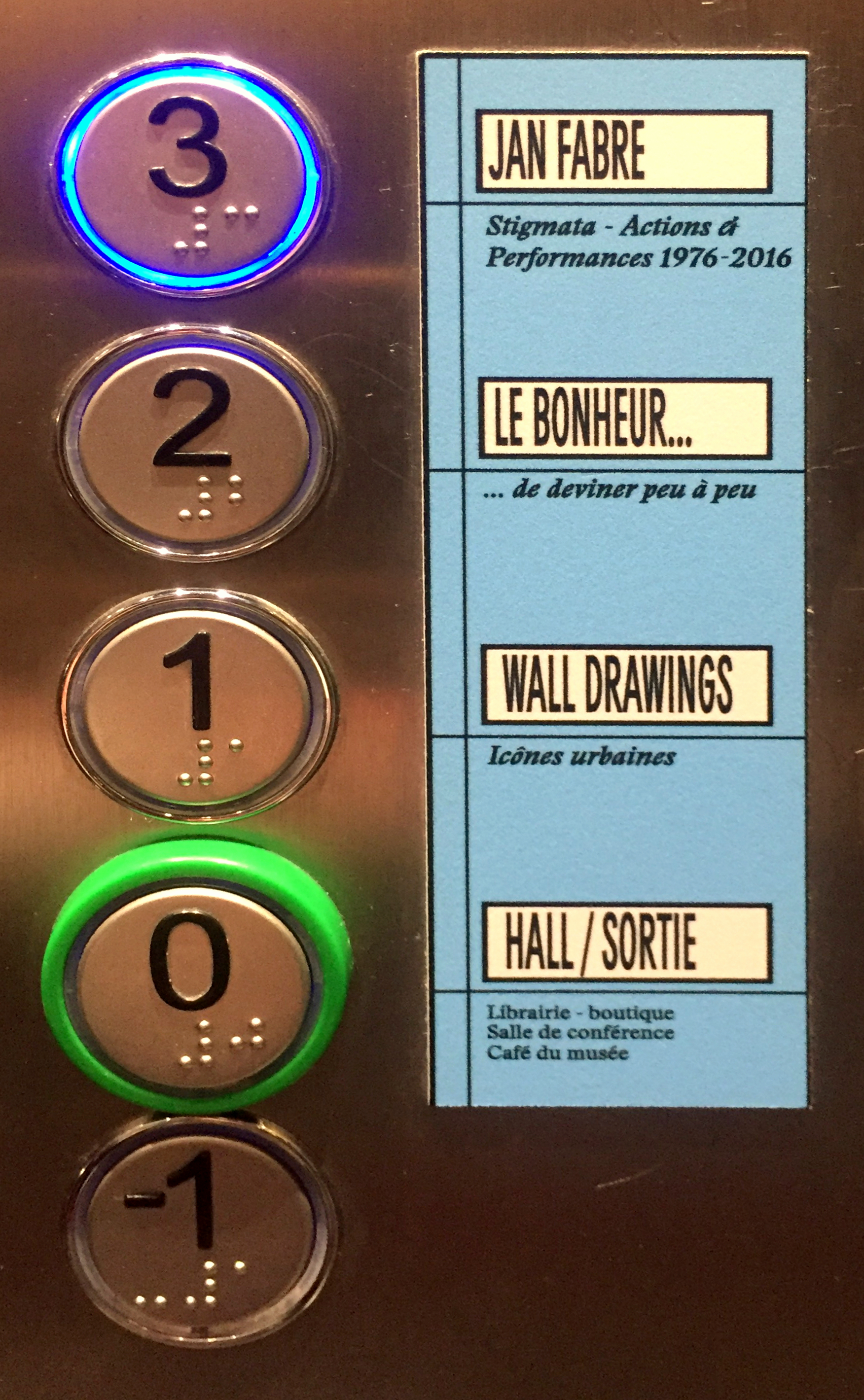 Boutons d'ascenseur au Mac Lyon durant l'expo Jan Fabre.